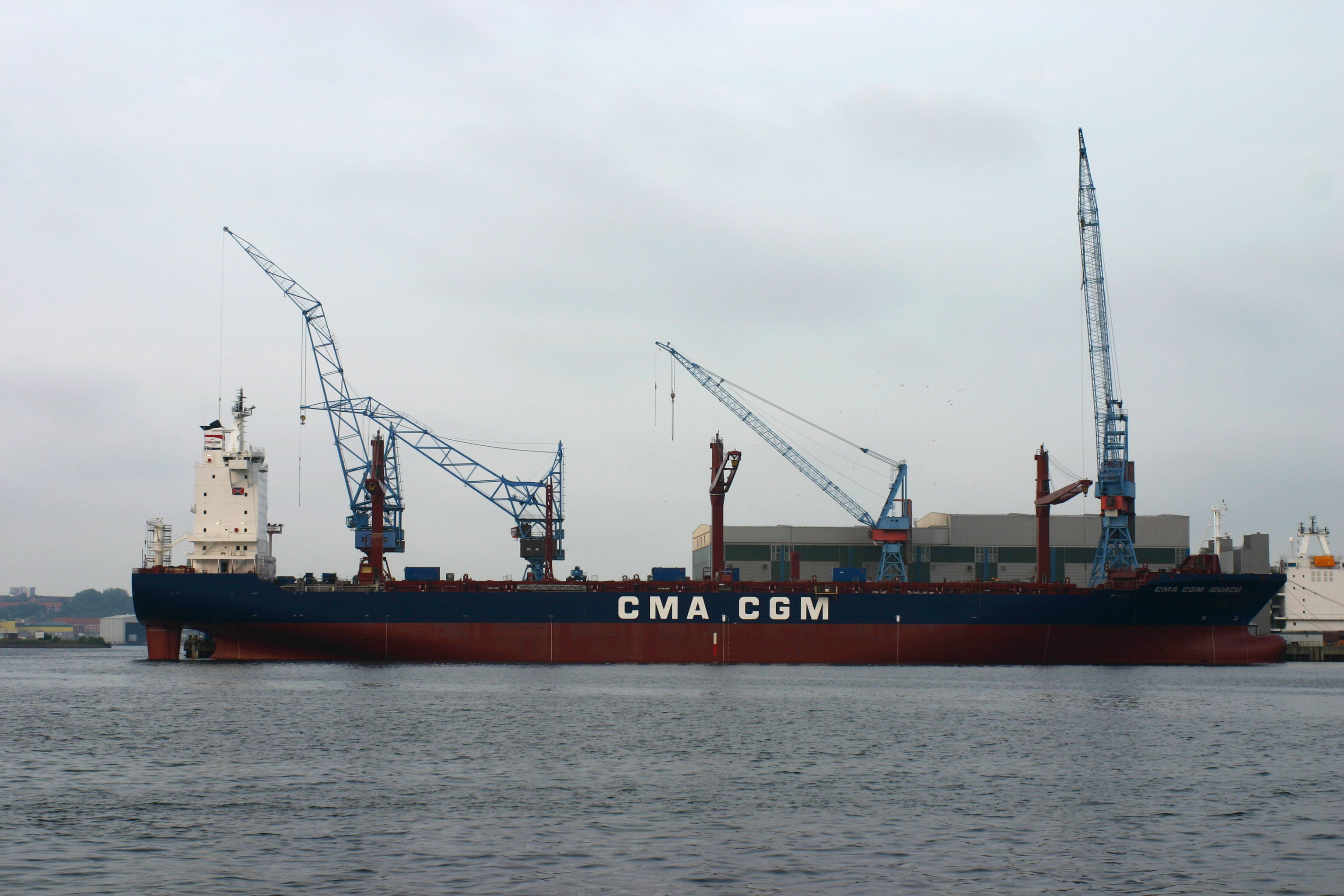 Der CMA CGM Iguacu auf der Weft in Kiel IMO Number: 9344552 MMSI Number: 218724000 Callsign: DDQI2 Length: 211 m Beam: 30 m